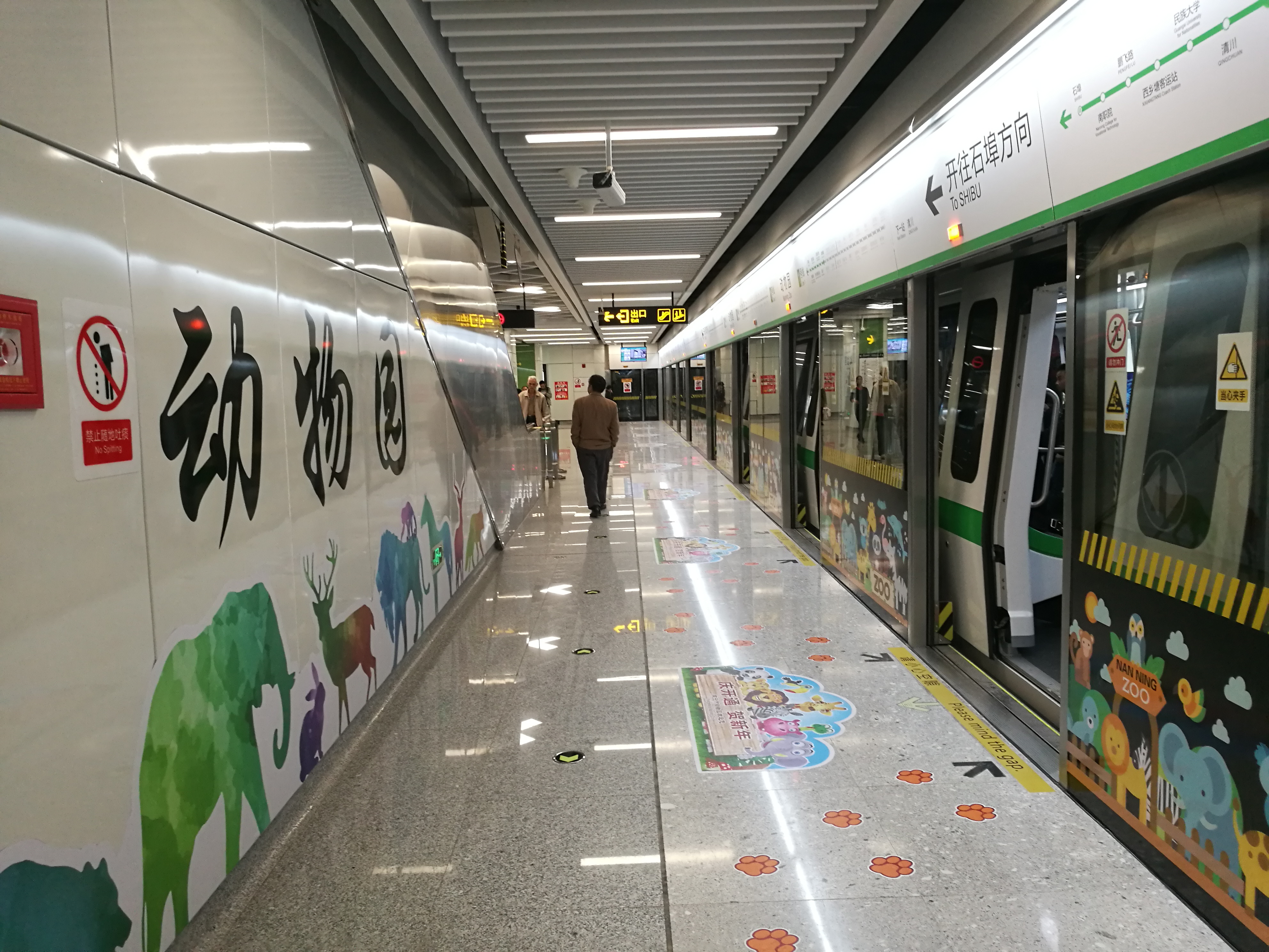 南宁轨道交通动物园站